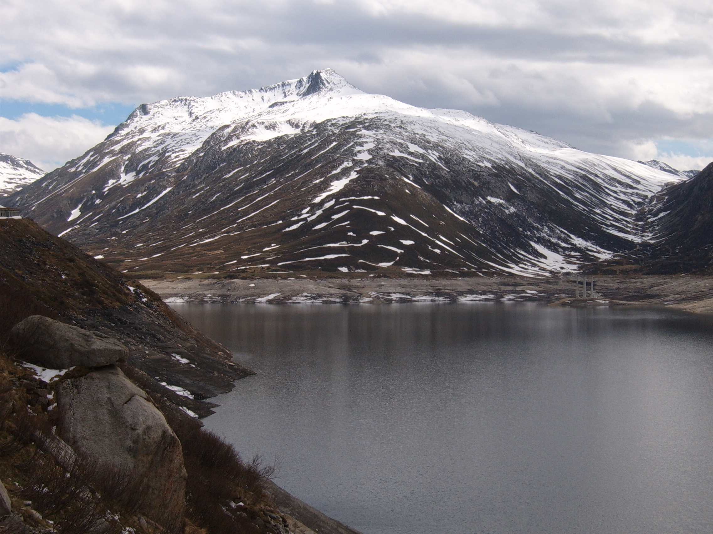 Lai da Sontga Maria, Passo del Lucomagno, Canton of Grisons (Switzerland)